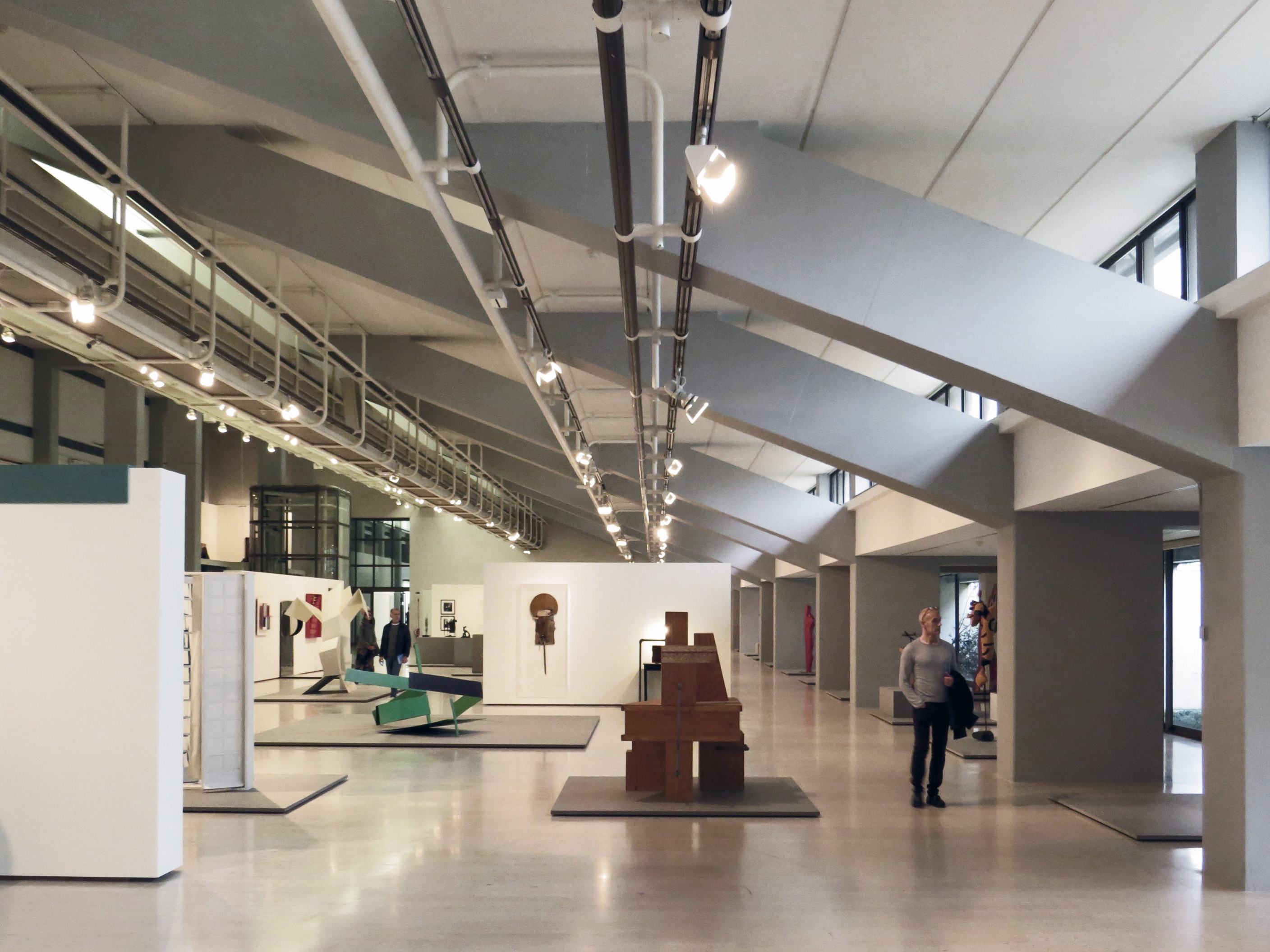 lisboa, portugal janeiro de 2018